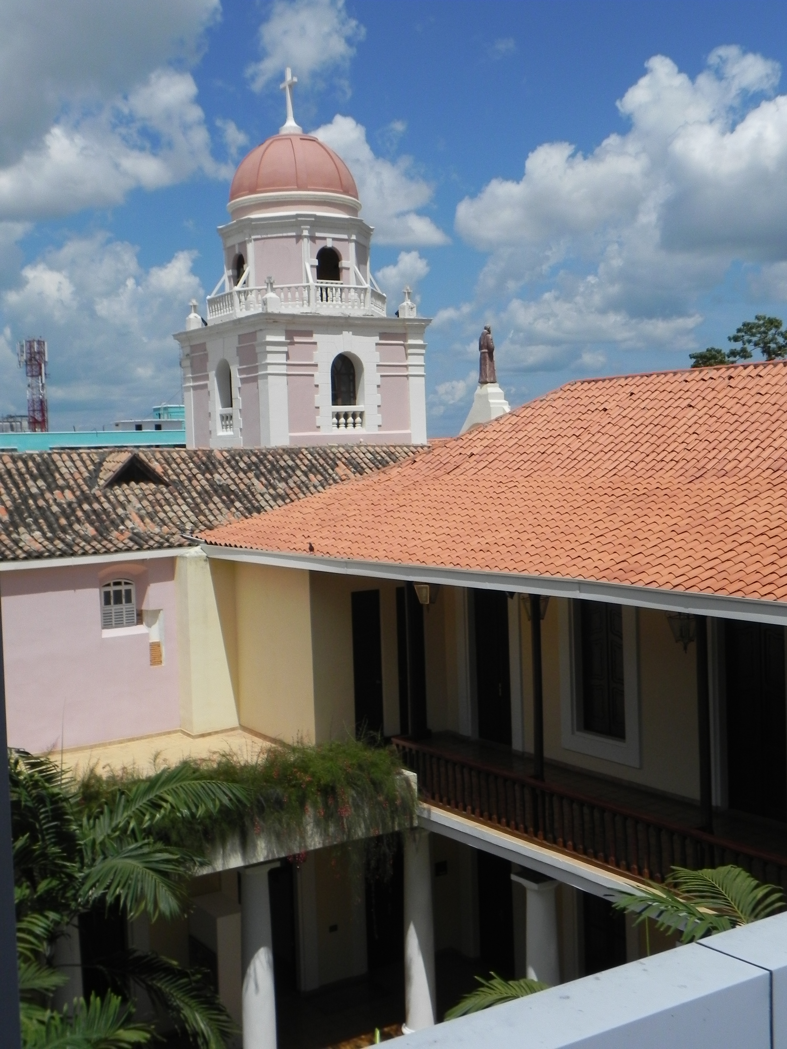 Antiguo colonial Convento de San Francisco de Valencia (dedicado a San Buenaventura) — de Valencia, en Venezuela.